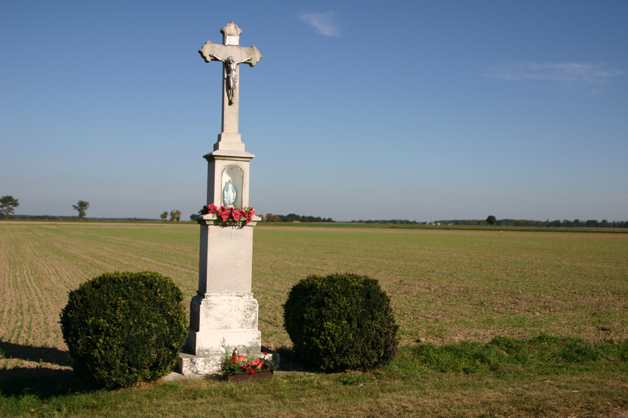 Trawniki – wieś w Polsce położona w województwie opolskim, w powiecie kędzierzyńsko-kozielskim, w gminie Pawłowiczki.